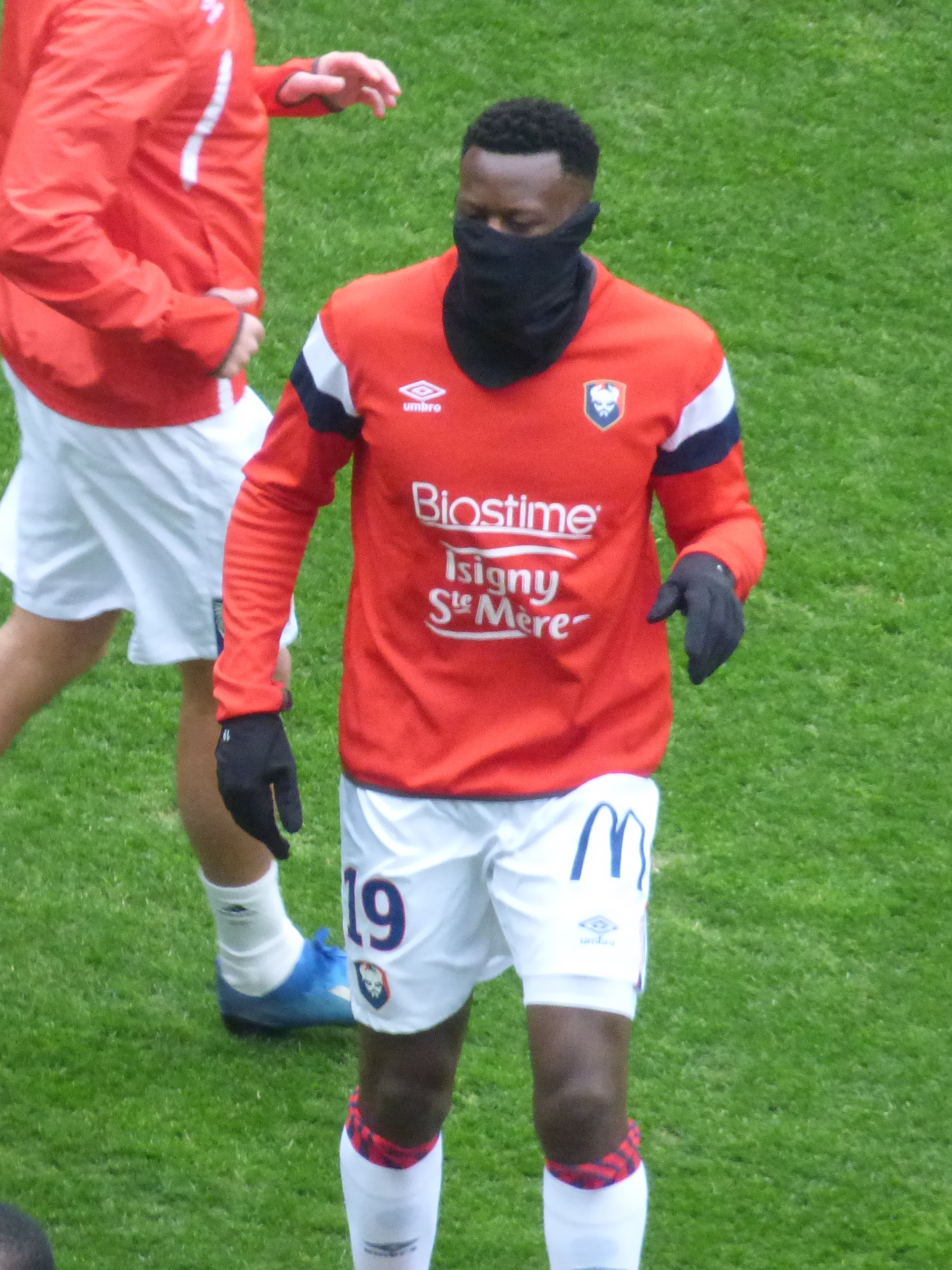 Malik Tchokounté avant le match RC Lens / SM Caen, comptant pour la vingt-sixième journée du championnat de France de football de Ligue 2 2019/2020, le 22 février 2020, au Stade Bollaert-Delelis